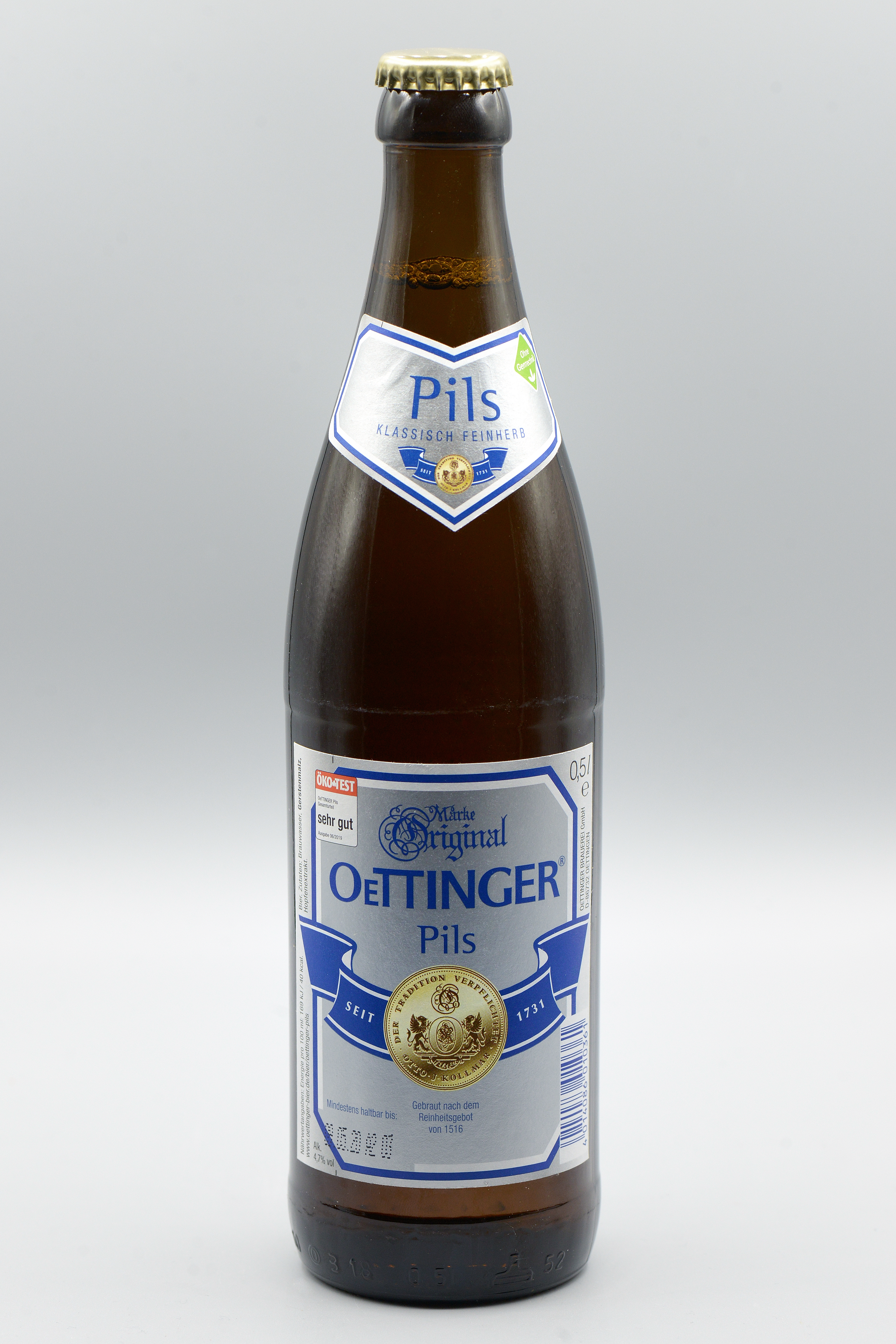 Verändertes Etikett etwa ab Oktober 2019, Pils der Oettinger Brauerei GmbH in der NRW-Flasche (2019).